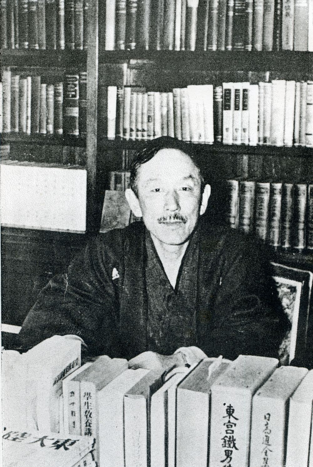 この写真は中野正剛(1886-1943)の1942年のものです。